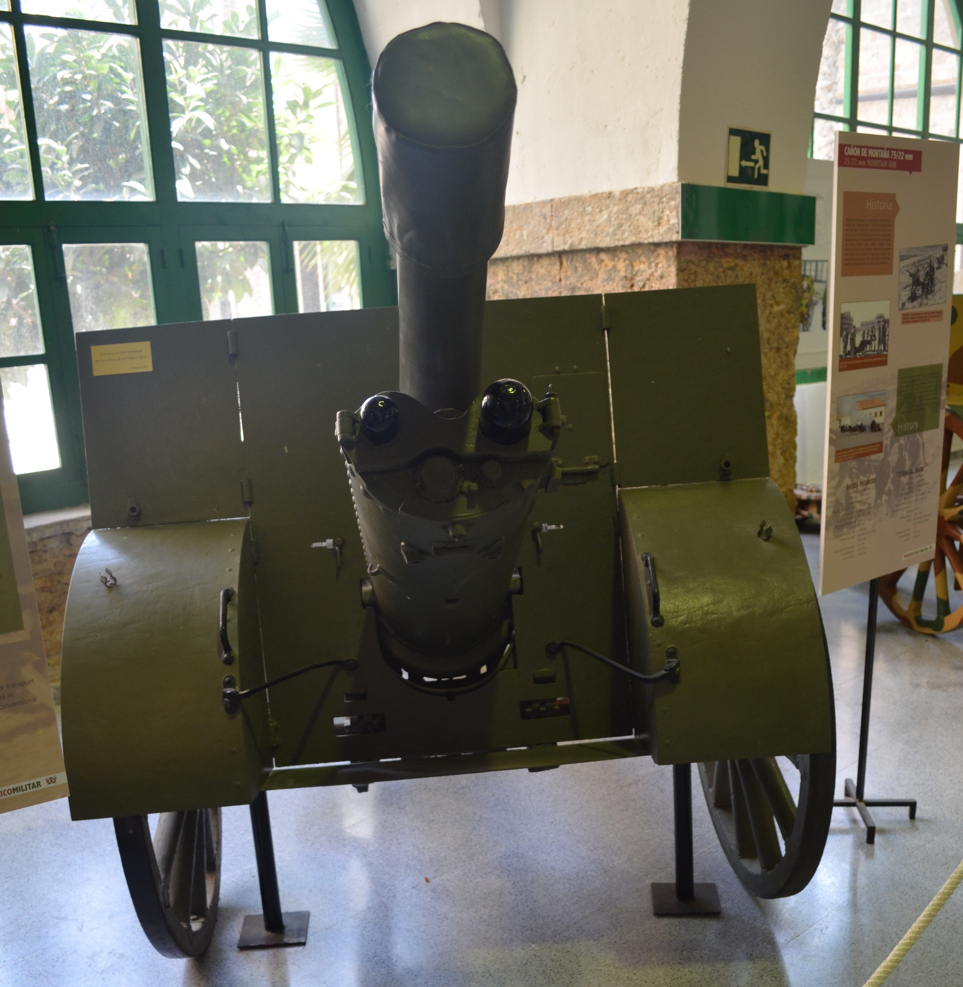 Pieza de montaña Schneider 75/22